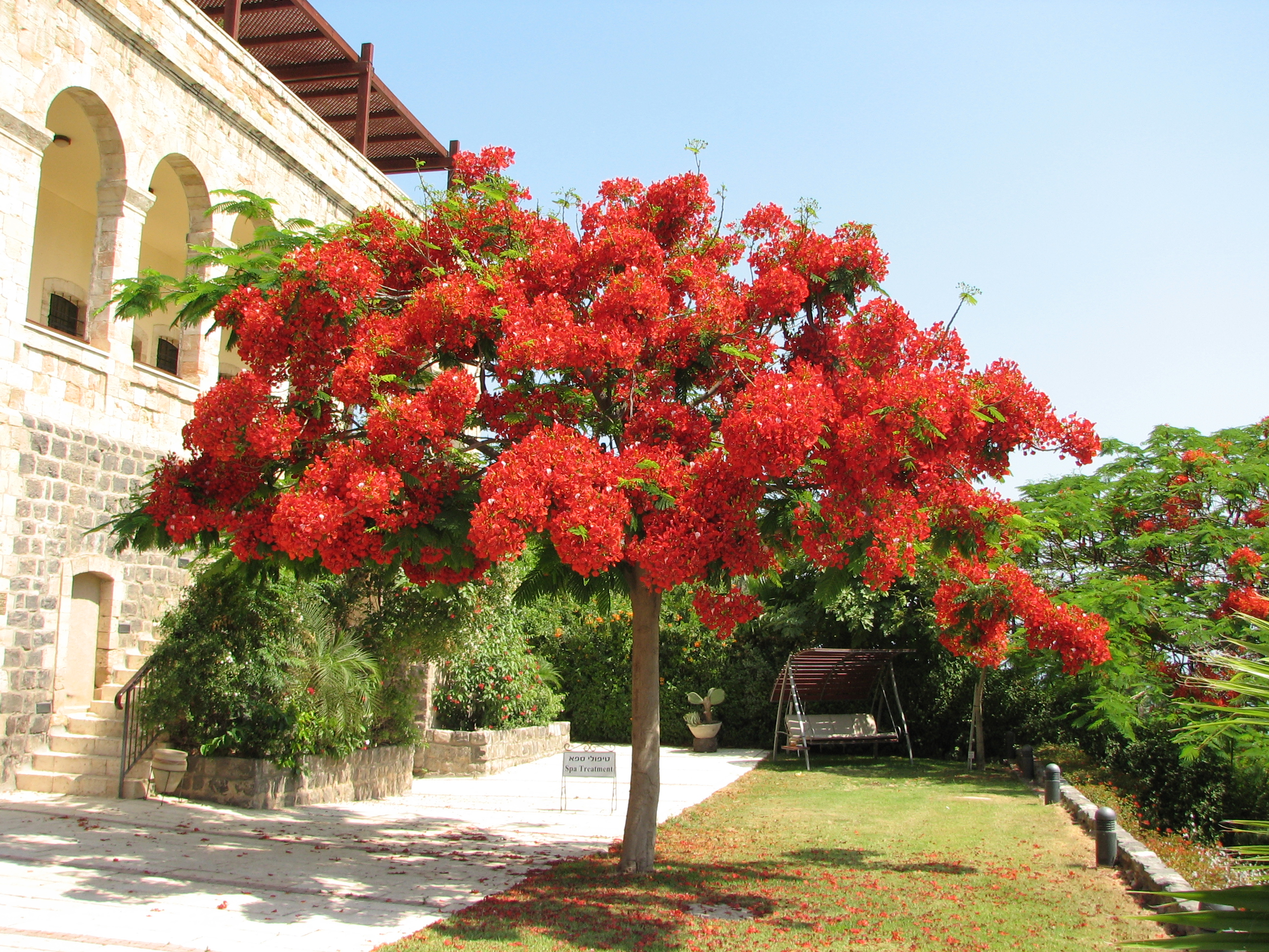 The Scots Hotel – A boutique hotel, situated in a old historical compound on the shore of the Sea of Galilee. המלון הסקוטי הוא בית מלון בעיר טבריה, הנמצא בבעלותה של הכנסייה של סקוטלנד. המתחם בו שוכן המלון הוקם במאה ה-19 ושימש כבית חולים, ומאוחר יותר הוסב לאכסניה לצליינים ולבית הארחה, עד להפיכתו לבית מלון. צאלון נאה בגני המלון הסקוטי